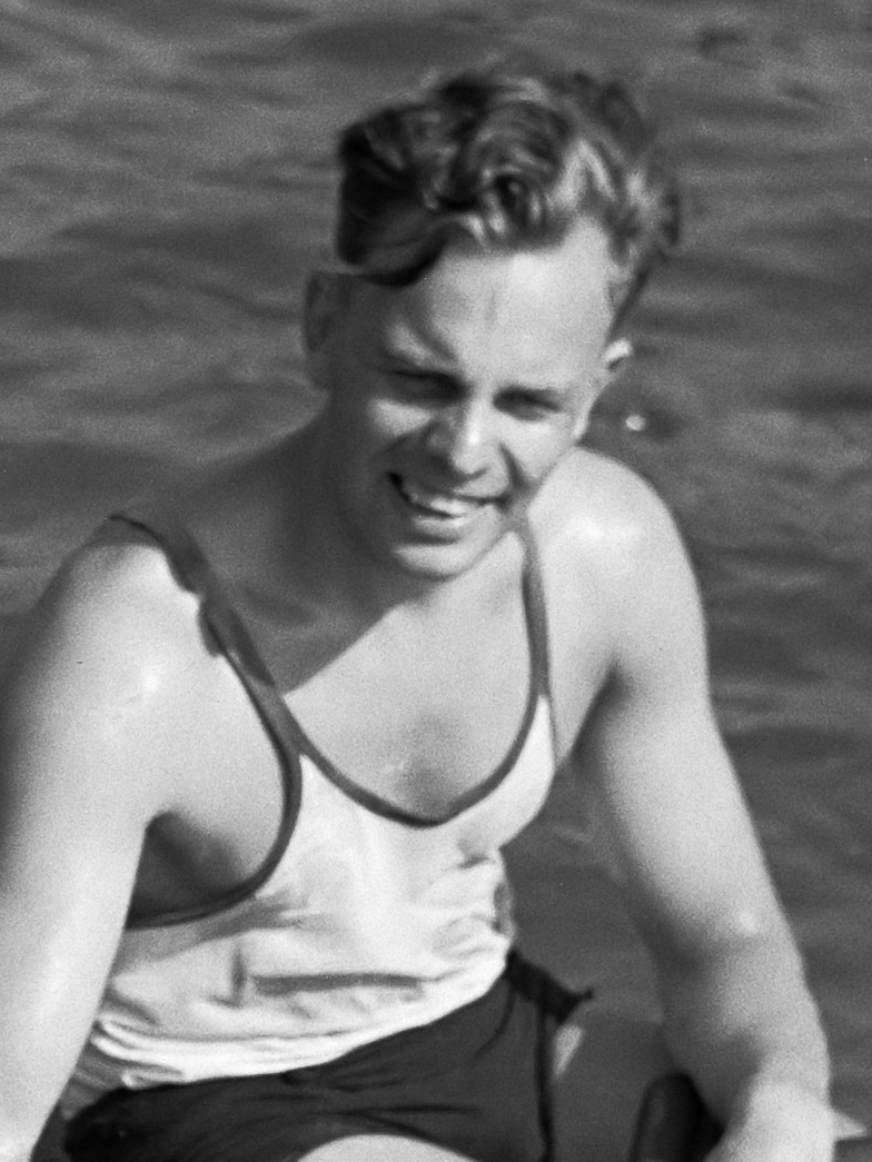 Roeiwedstrijden op de Bosbaan te Amsterdam. Skiffeur Tom Neumeier met zoontje 5 juli 1953